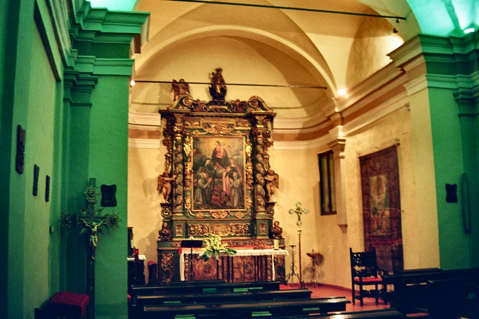 Fara Novarese (NO), Oratorio di Santa Marta: interno.